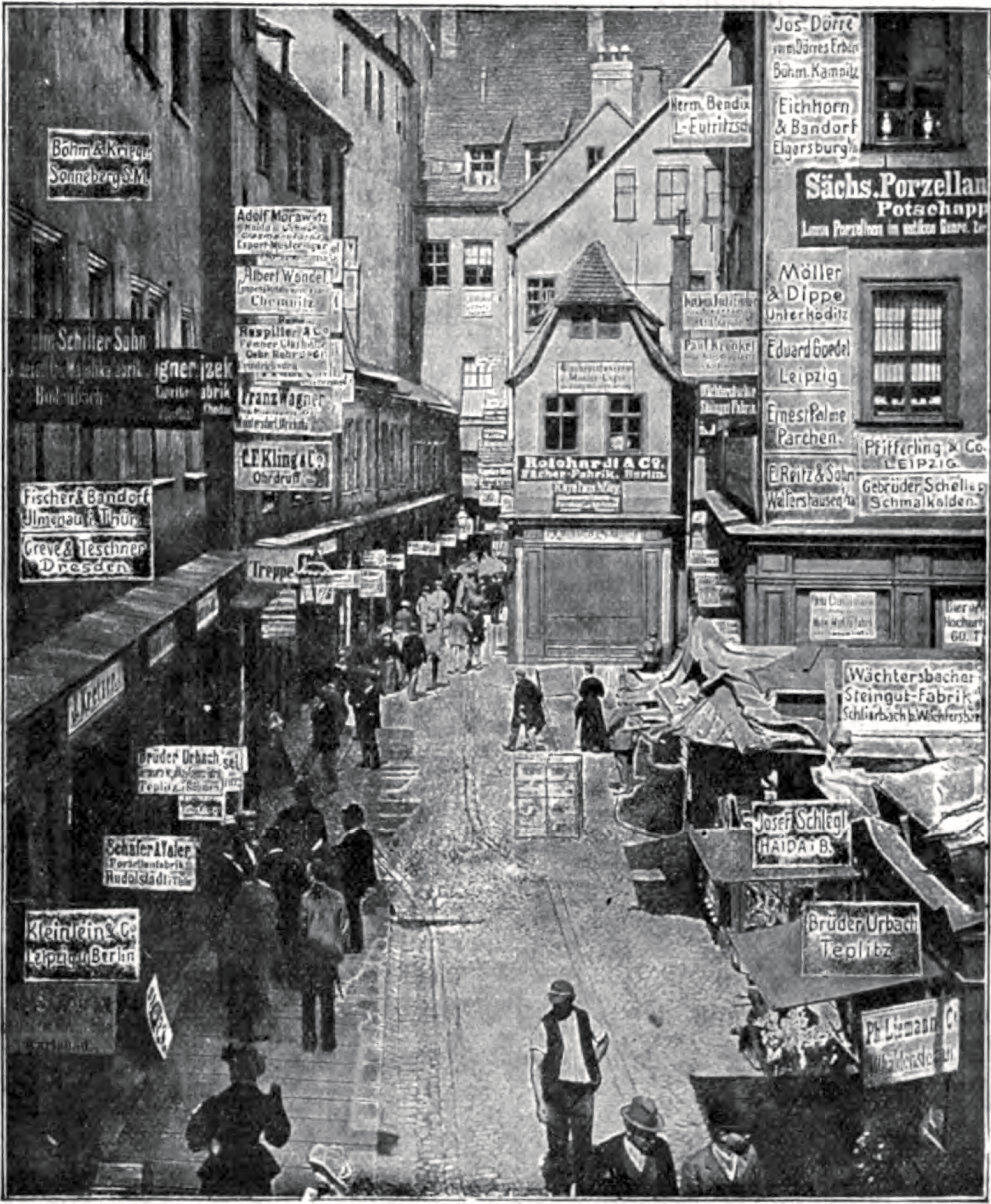 Auerbachs Hof in Leipzig, Sachsen, Deutschland zur Leipziger Messe Frühjahr 1905